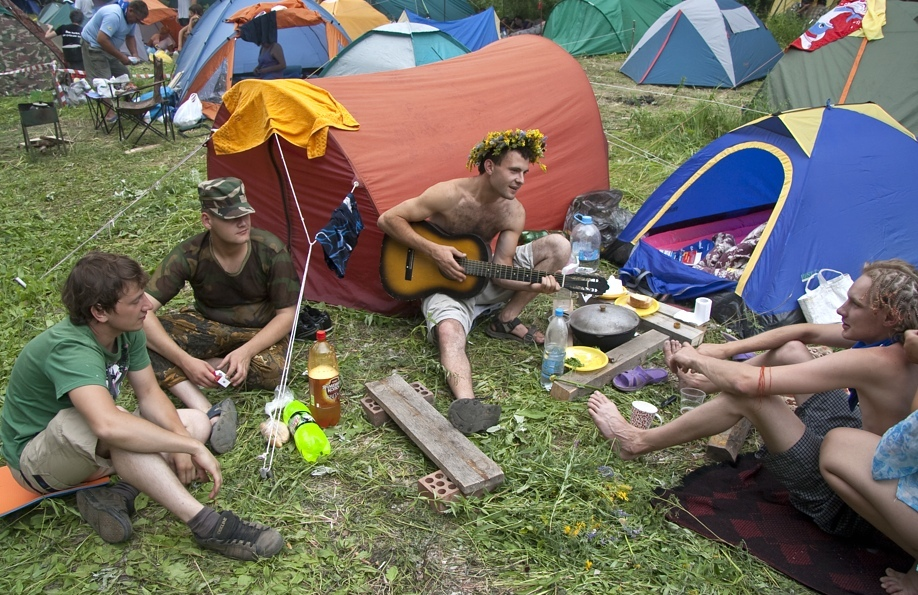 Грушинский фестиваль, Самарская область, Россия